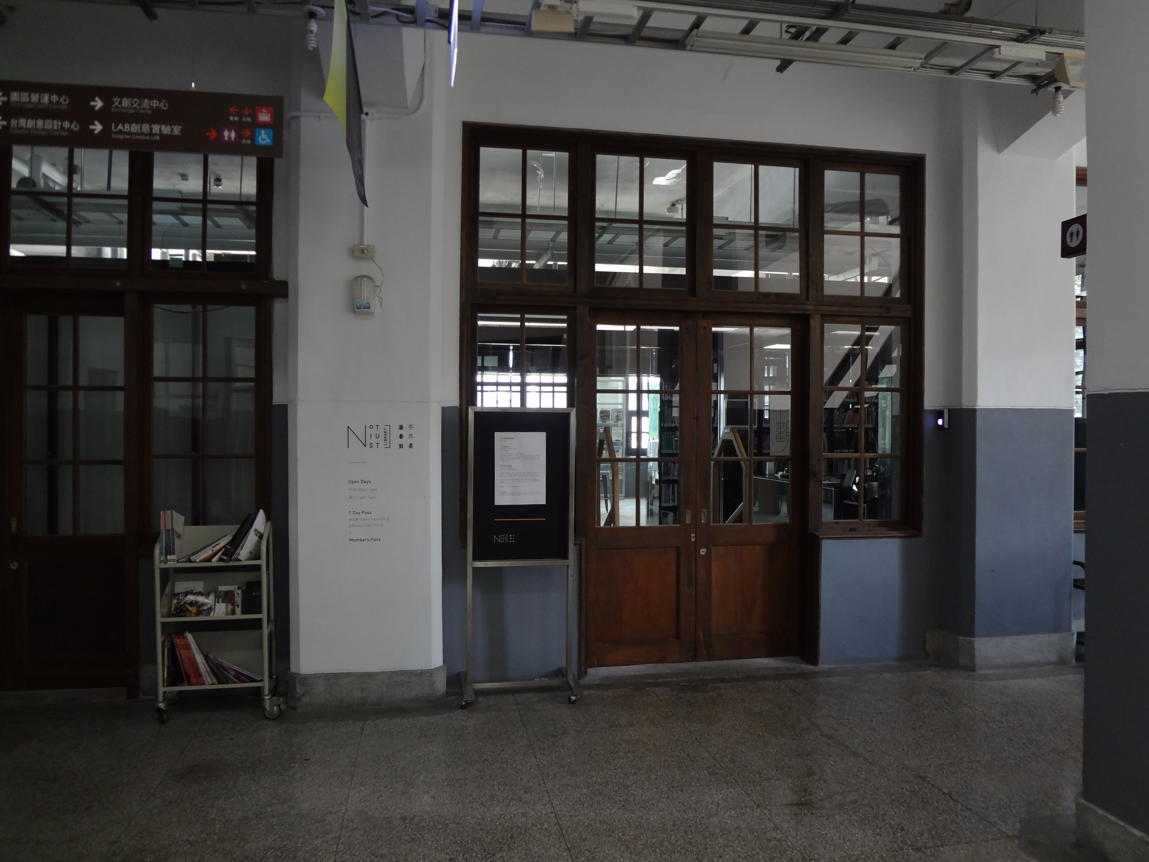 不只是圖書館，位於臺北市松山文化創意園區製菸工廠北側2樓。